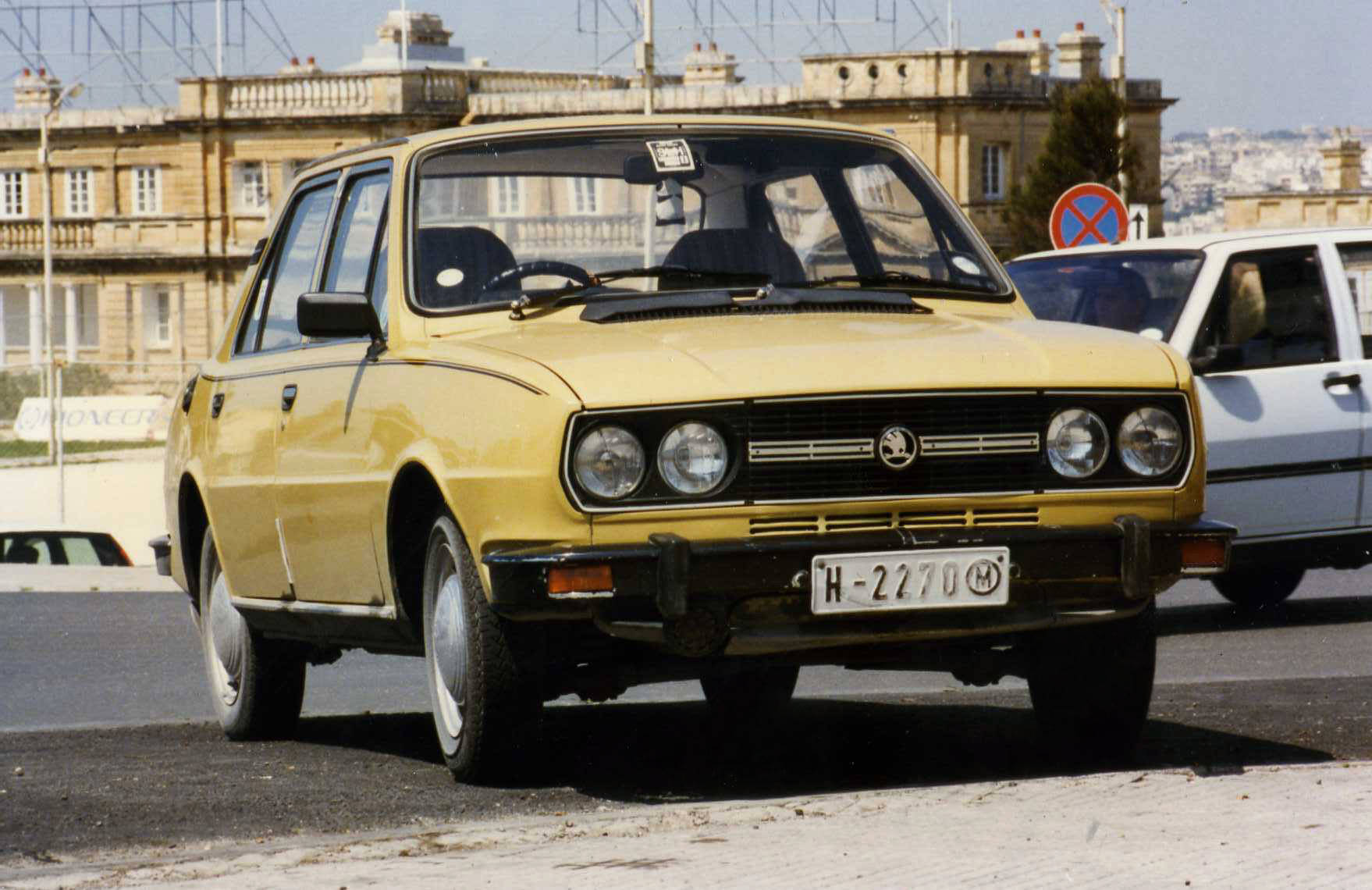 Škoda Estelle, Malta 1996